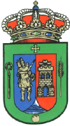 San Miguel